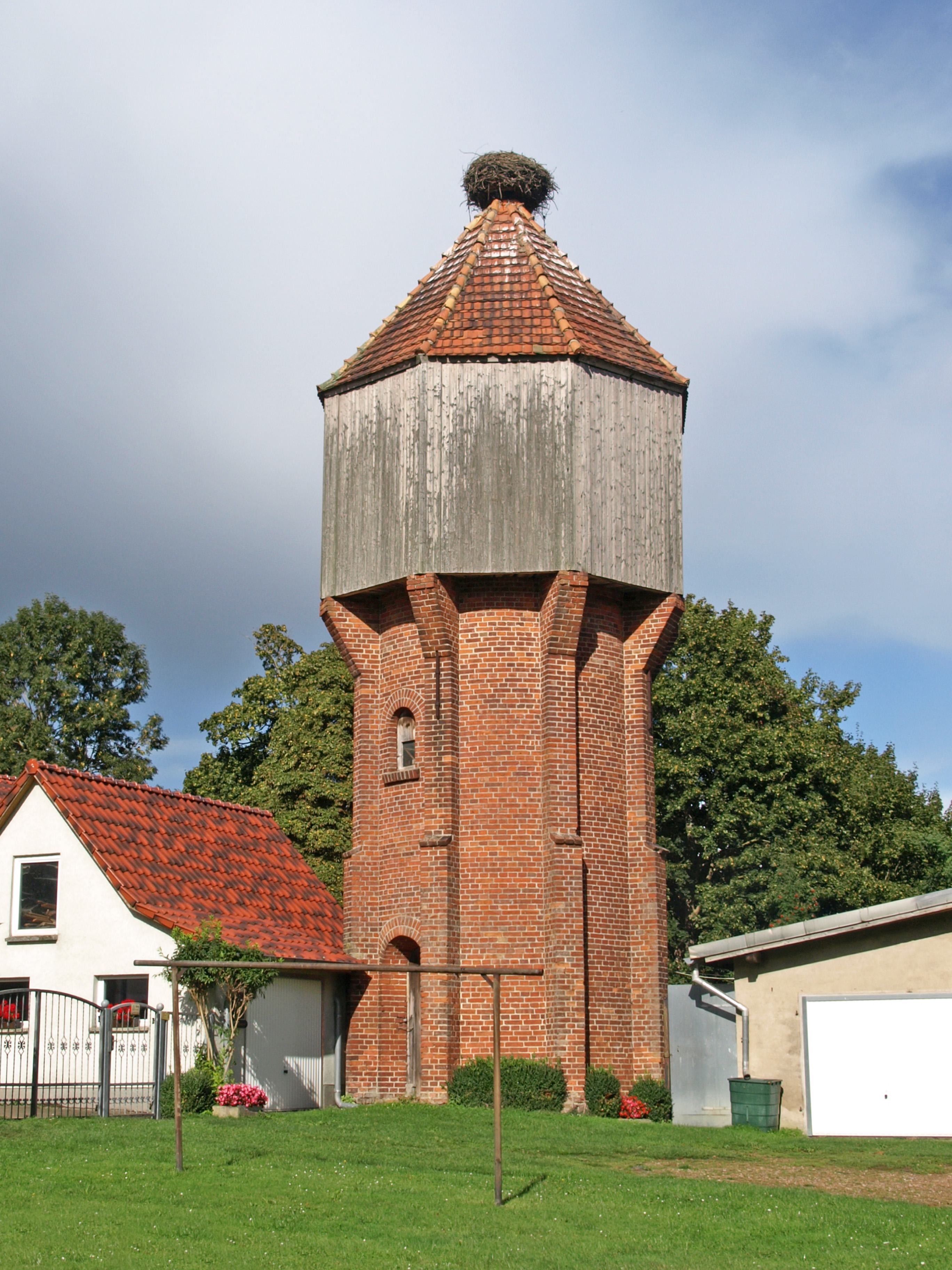 Wasserturm auf dem ehemaligen Gutsgelände in Brunn